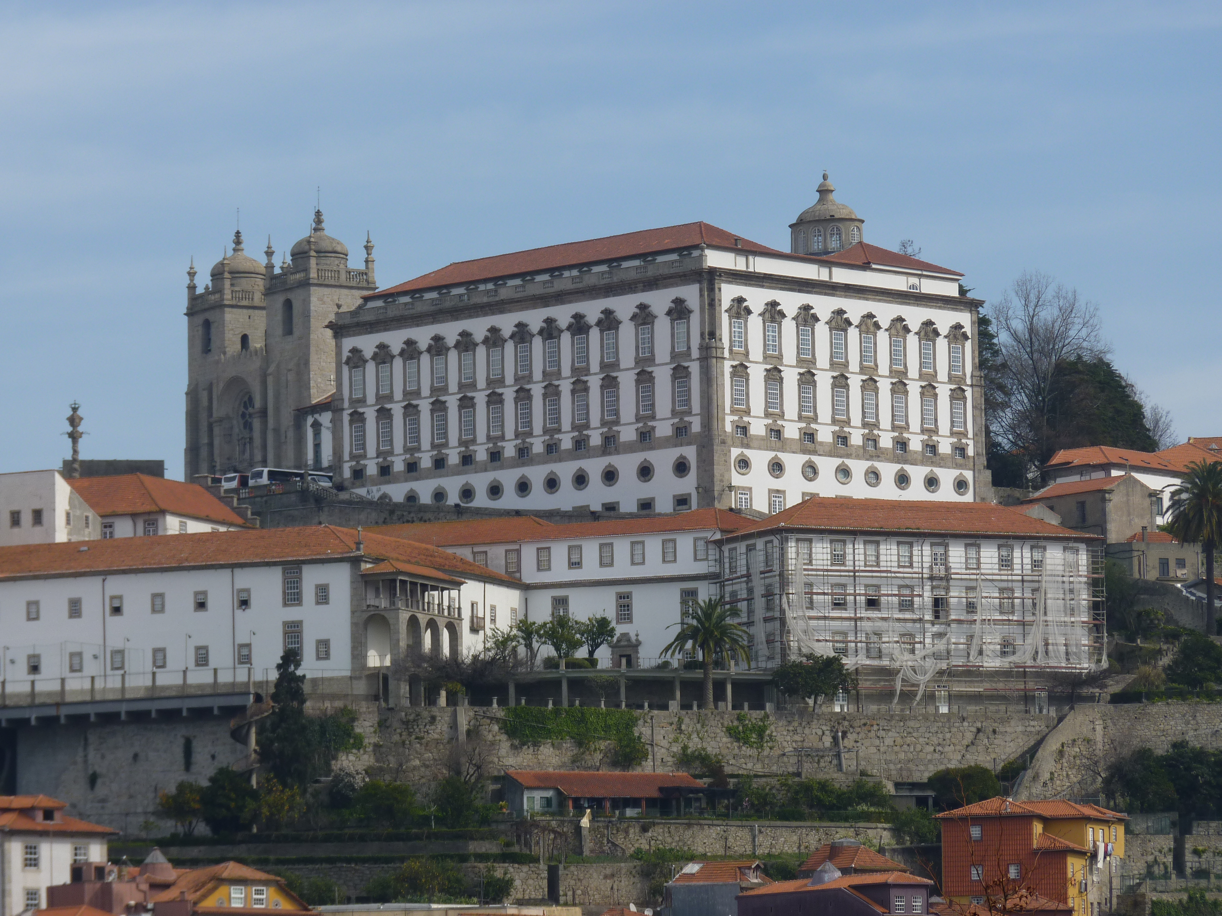 Porto